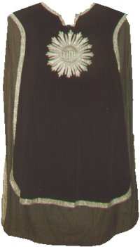 Mässhake i Lits kyrka